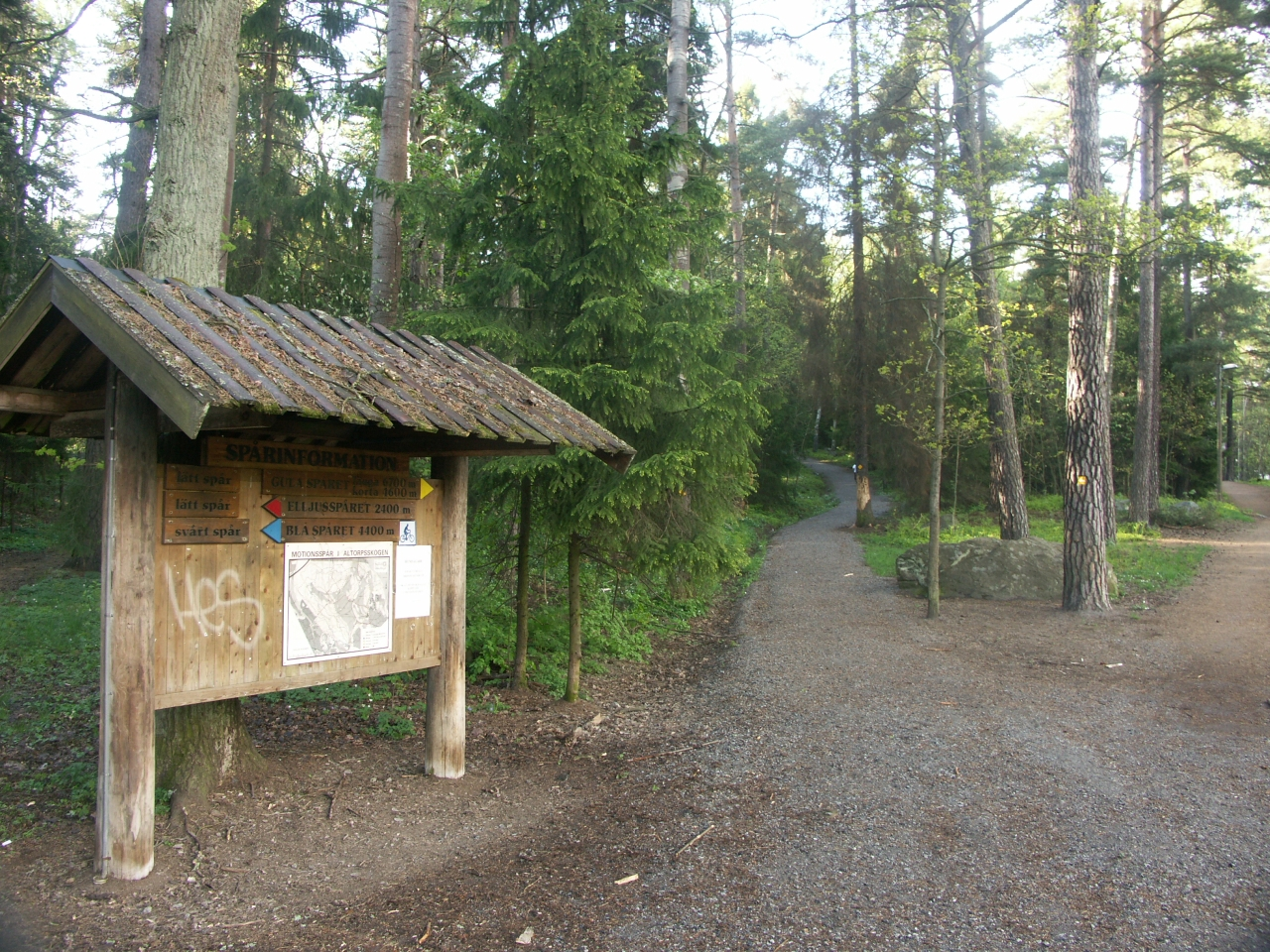 En bild på början av Altorpsskogen